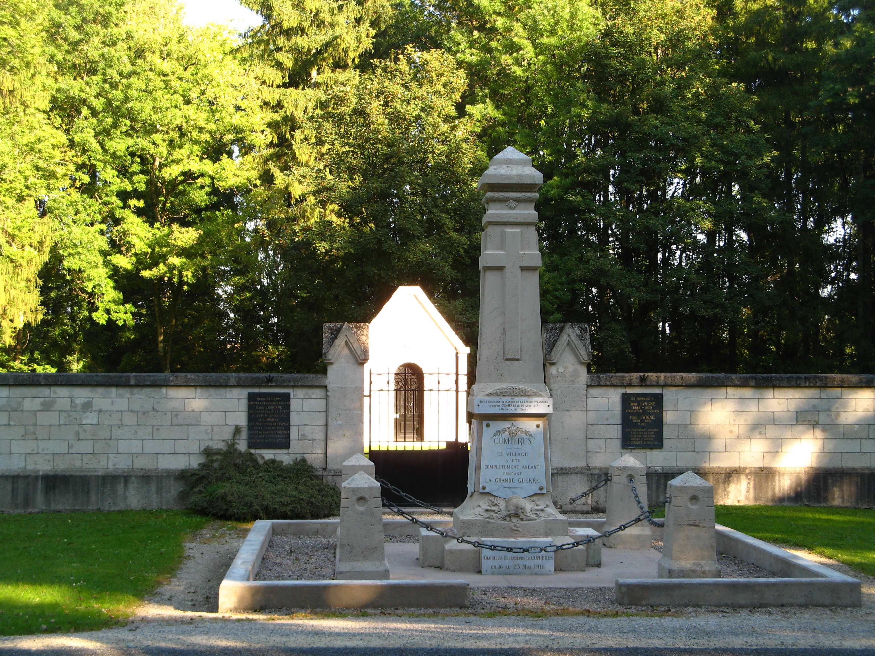 Cumières-le-Mort-Homme (Meuse, France), village mort pour la France, détruit pendant la Première Guerre Mondiale.